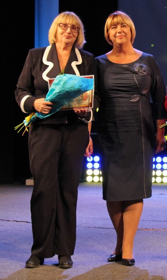 Завідувач відділу документів іноземними мовами обласного комунального закладу «Сумська обласна універсальна наукова бібліотека» Тетяна Лучкіна та заступник начальника управління культури і туризму Сумської ОДА Ігнатченко Антоніна Миколаївна.